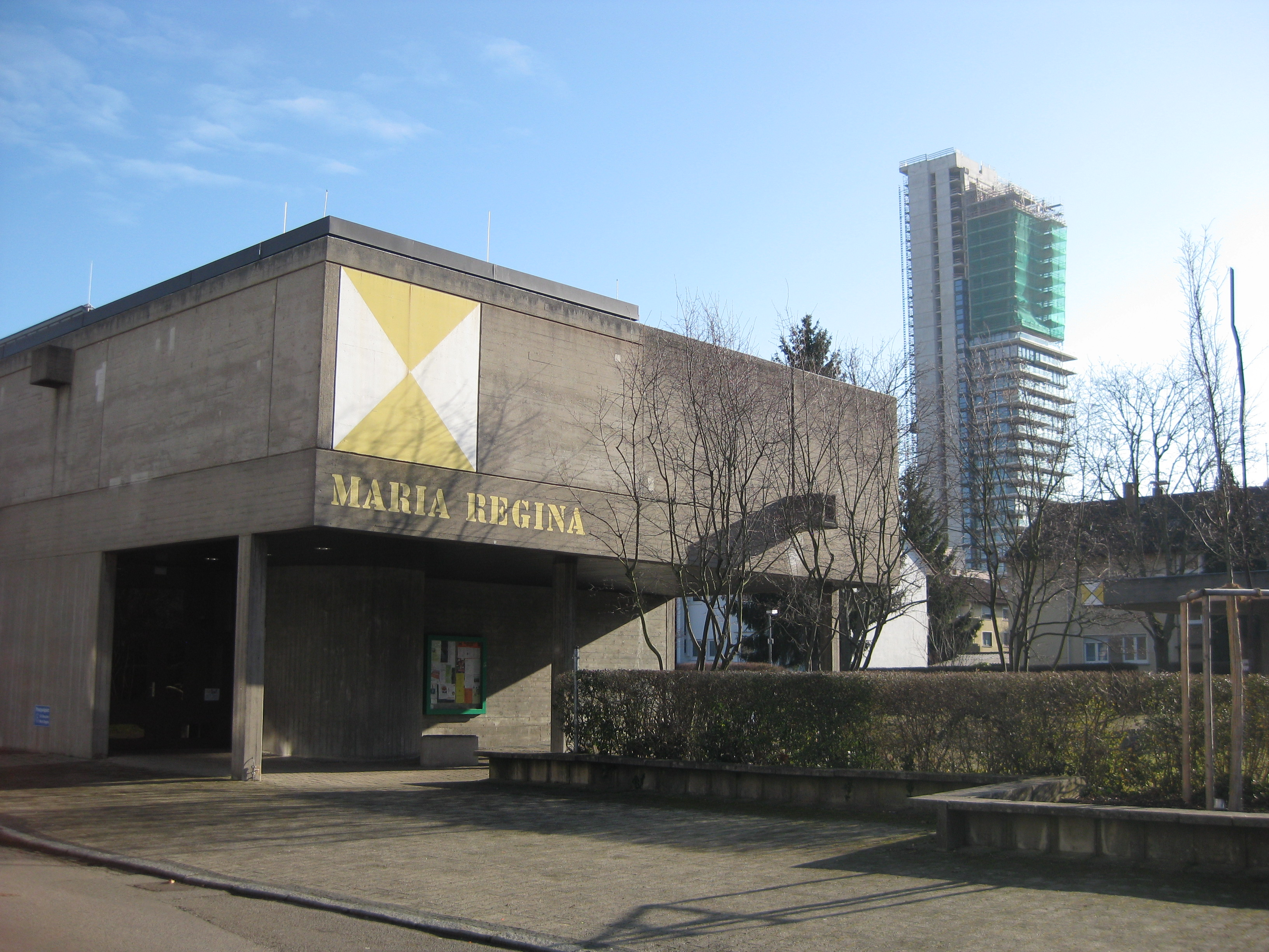 Maria Regina ist eine römisch-katholische Kirche in Fellbach.